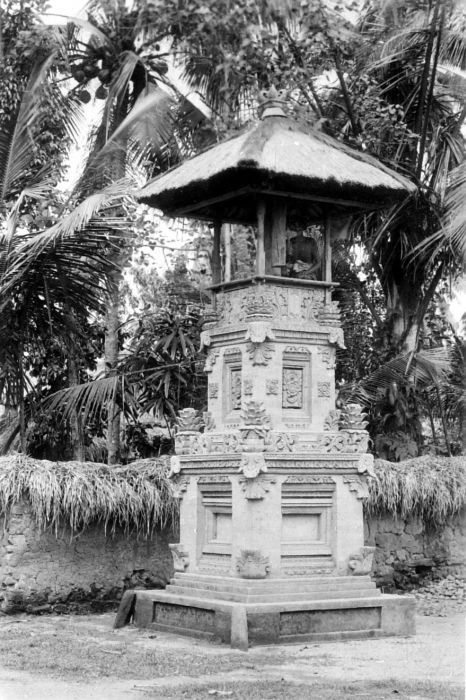 Negatief. Een wacht- of klokkentoren bij Denpasar